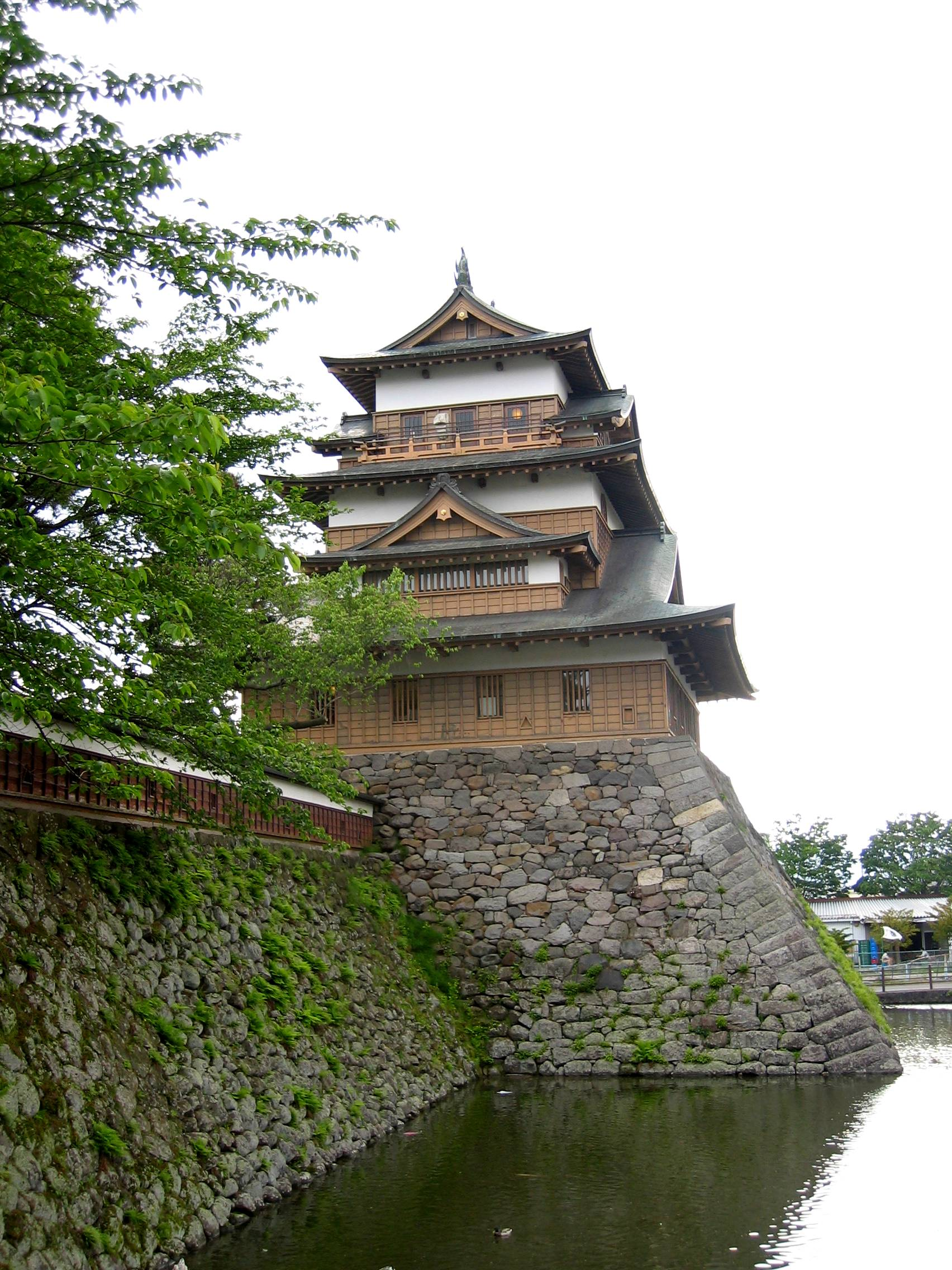 Takashima castle (Takashima-jo, 高島城) is a castle in Suwa-shi, Nagano, Japan.